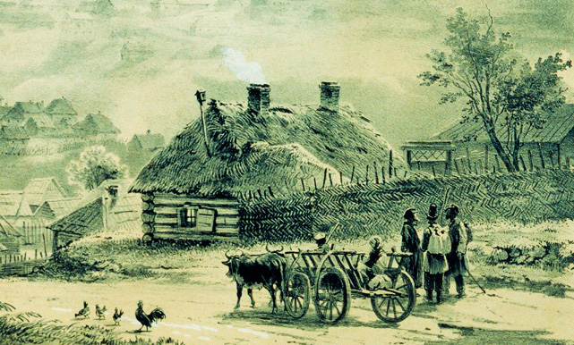 Вид Воронежа с западной стороны (фрагмент). XIX век.